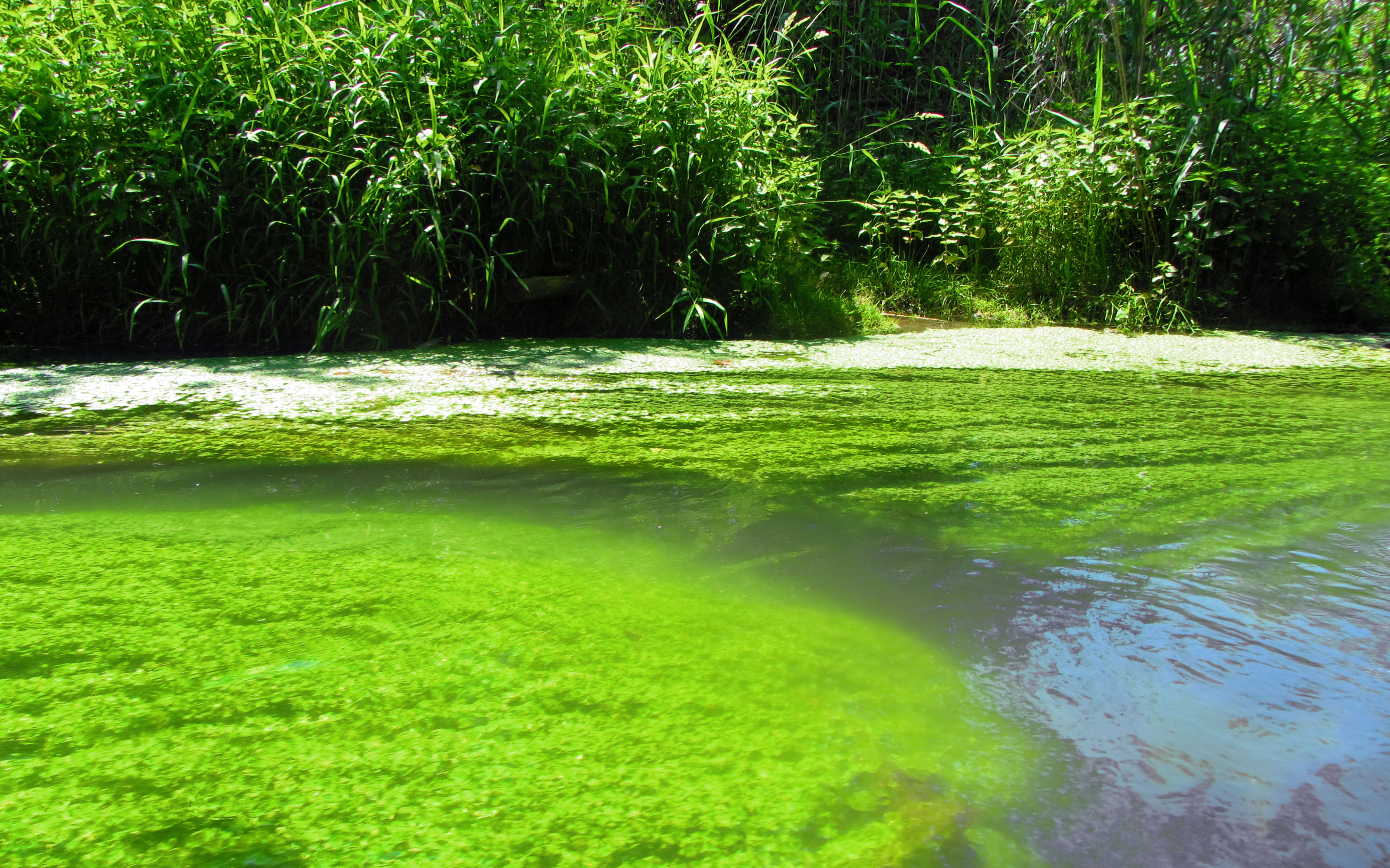 Unberührte Wald- und Wiesenlandschaft im Naturschutzgebiet Taubergießen (NSG 3.233), Baden-Württemberg.